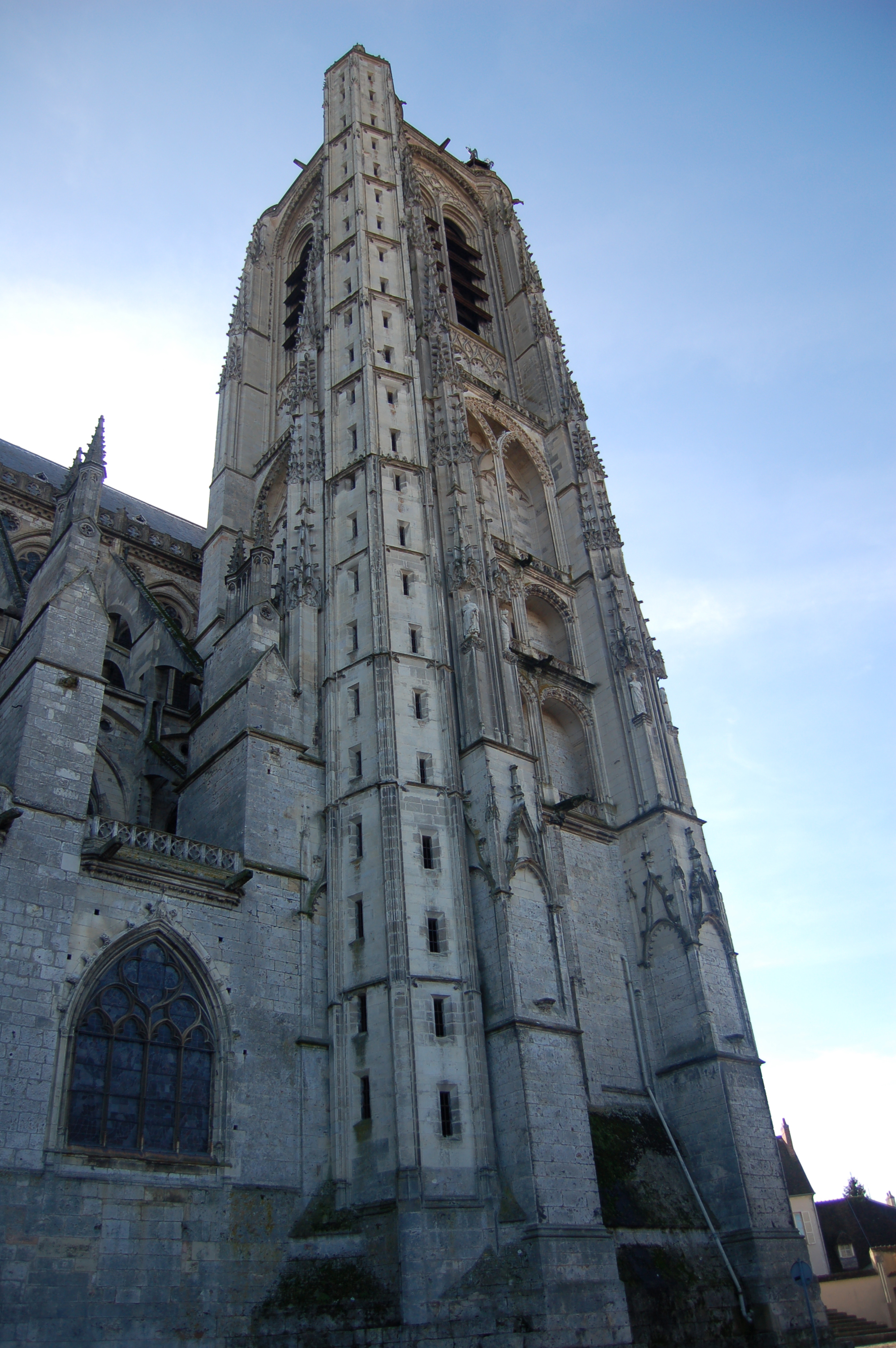 Tour de la Cathédrale Saint-Étienne de Bourges